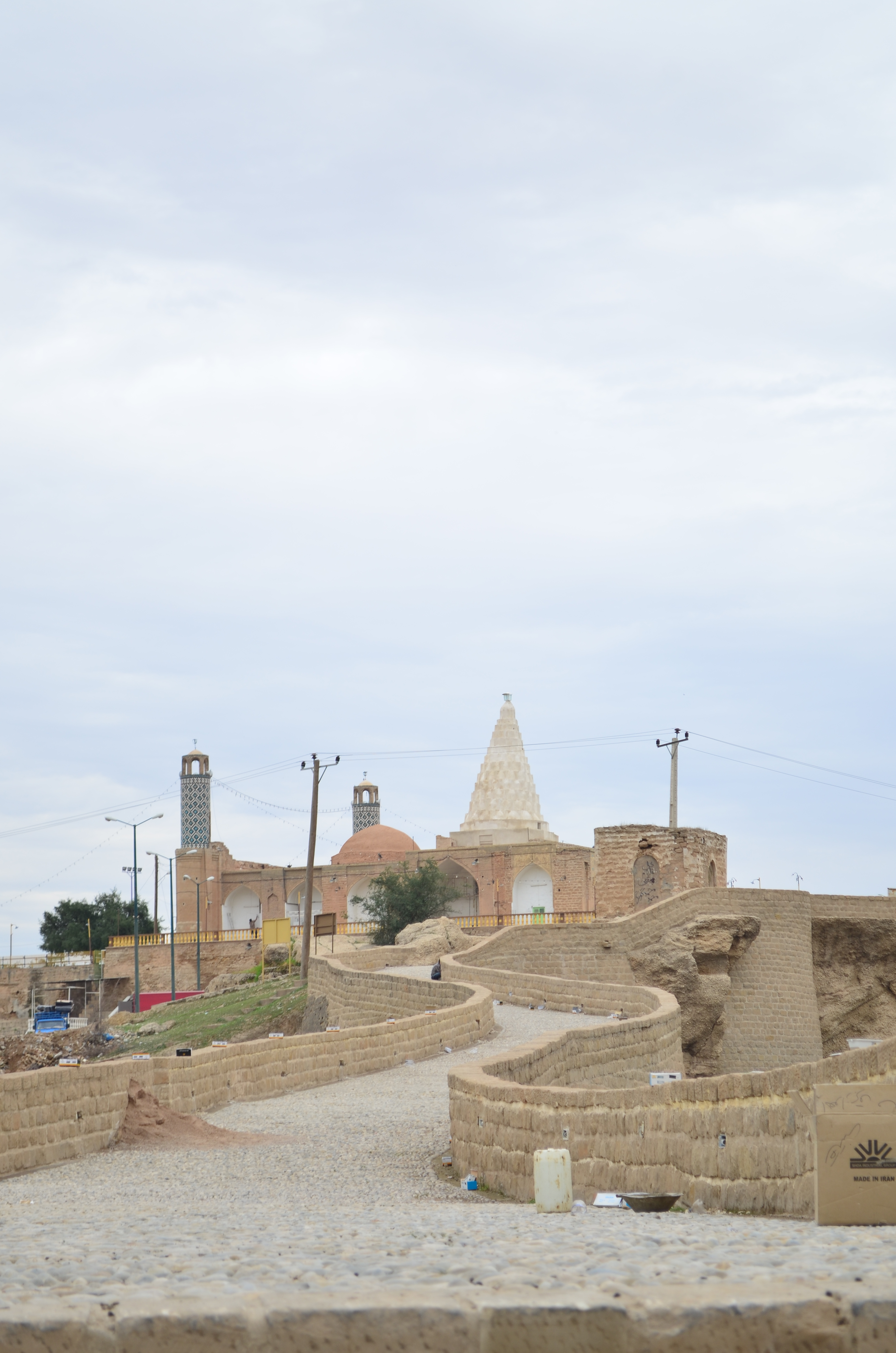 پل بند لشگر